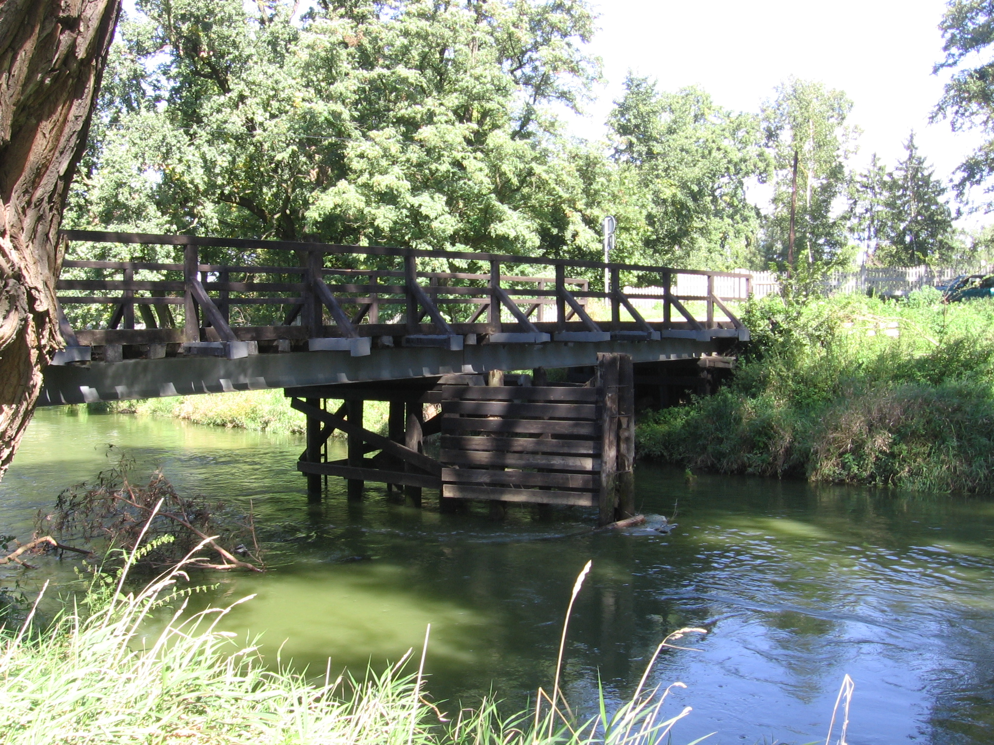 most Jarnołtowski nad Bystrzycą we Wrocławiu